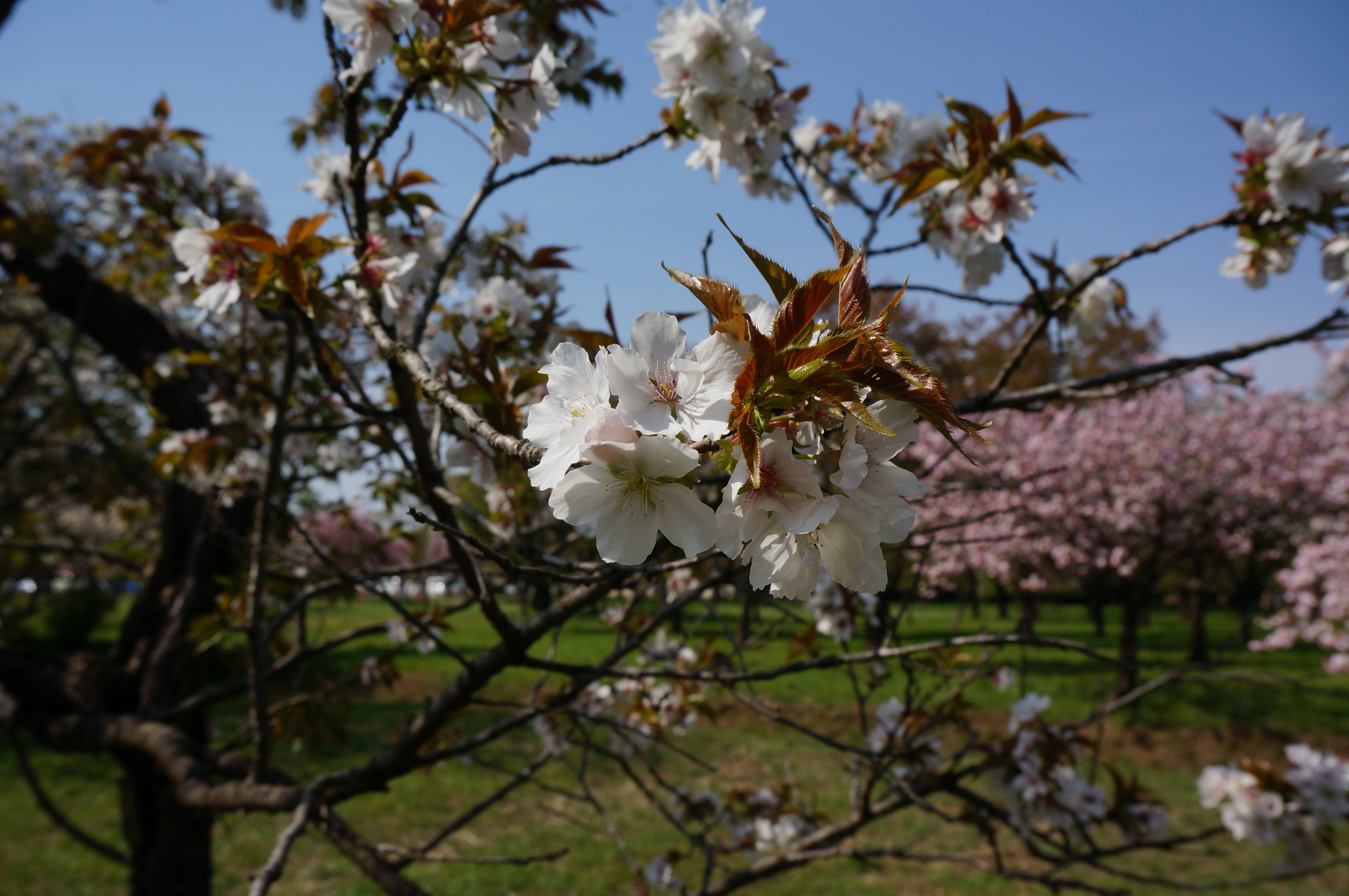 日本花の会結城農場さくら見本園にて